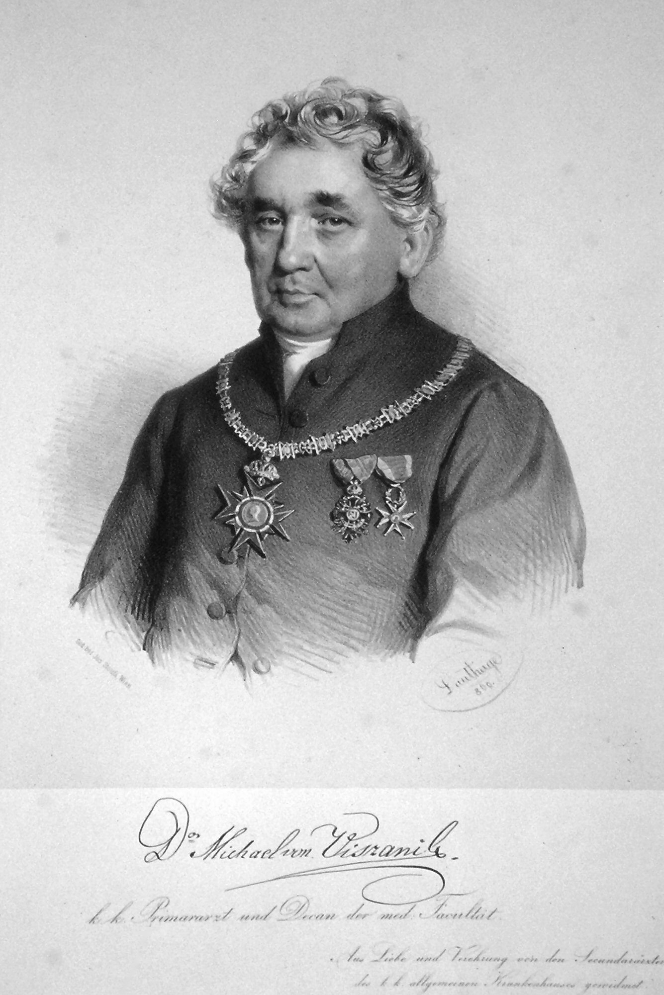 Michael von Viszanik (1792-1872), österreichischer Arzt und Psychiater. Lithographie von Adolf Dauthage, 1860